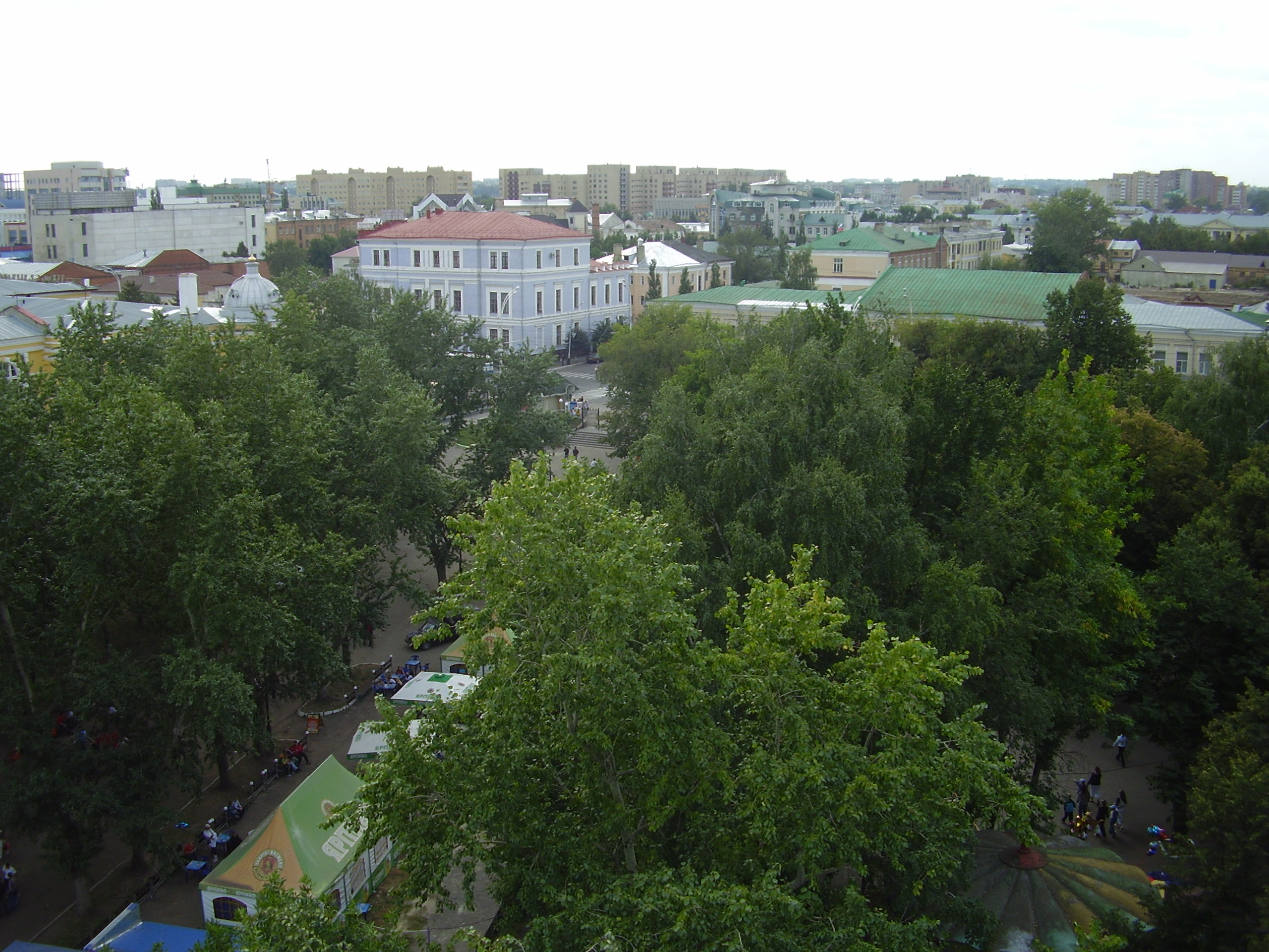 Тамбов,вид с колеса обозрения в городском парке